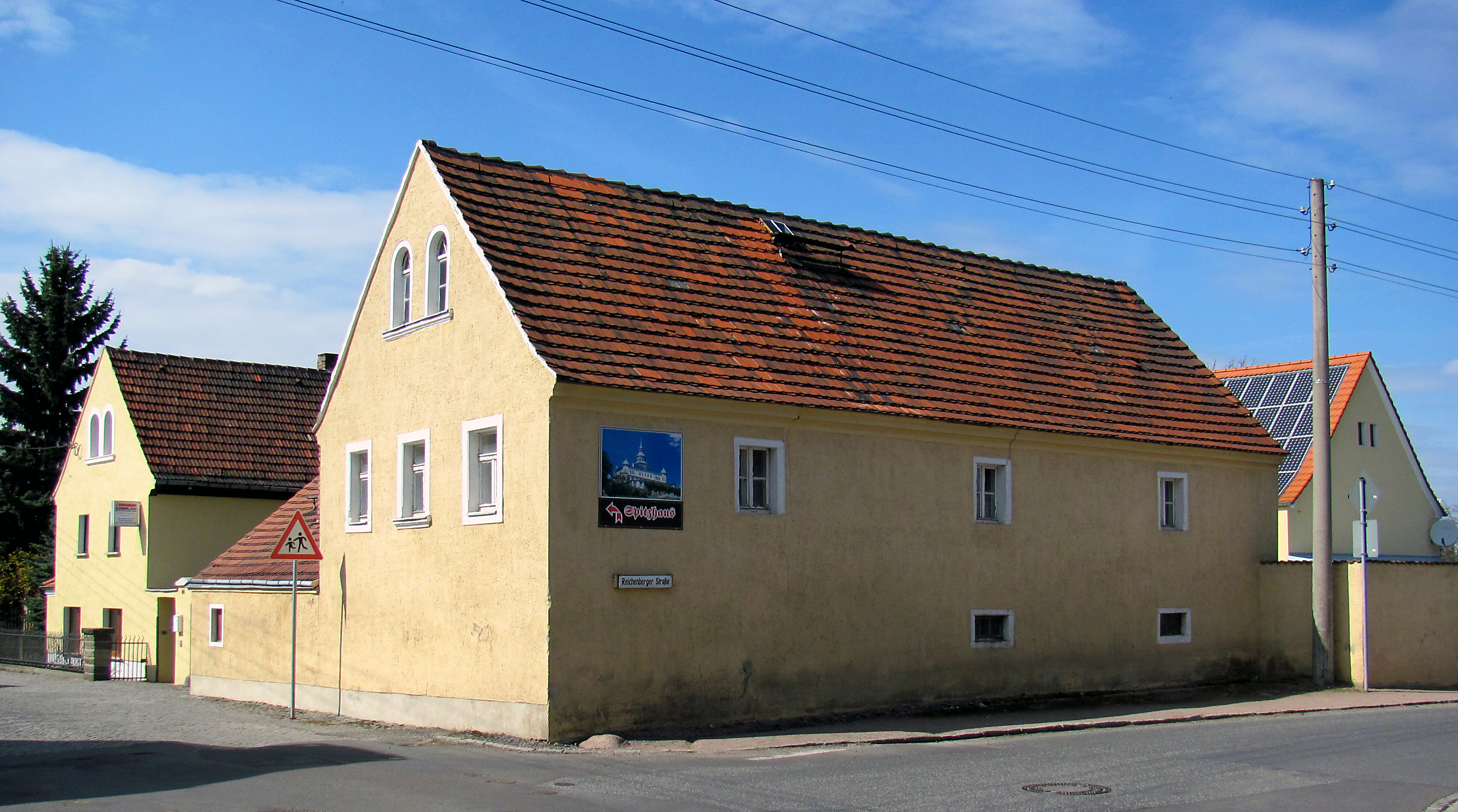 Radebeul, Dreiseithof Altwahnsdorf 44